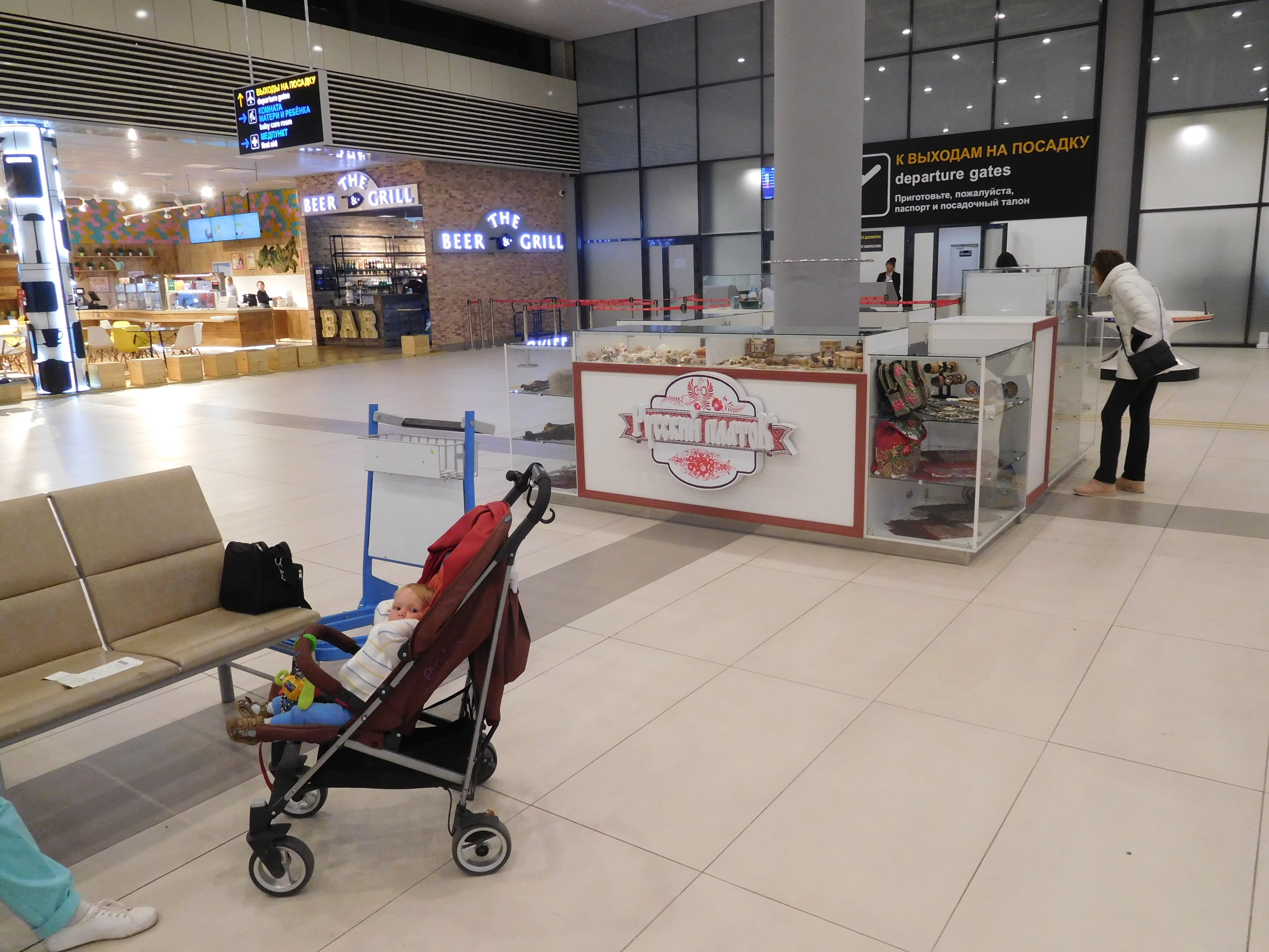 Аэропорт Витязево, выход на посадку в новом терминале